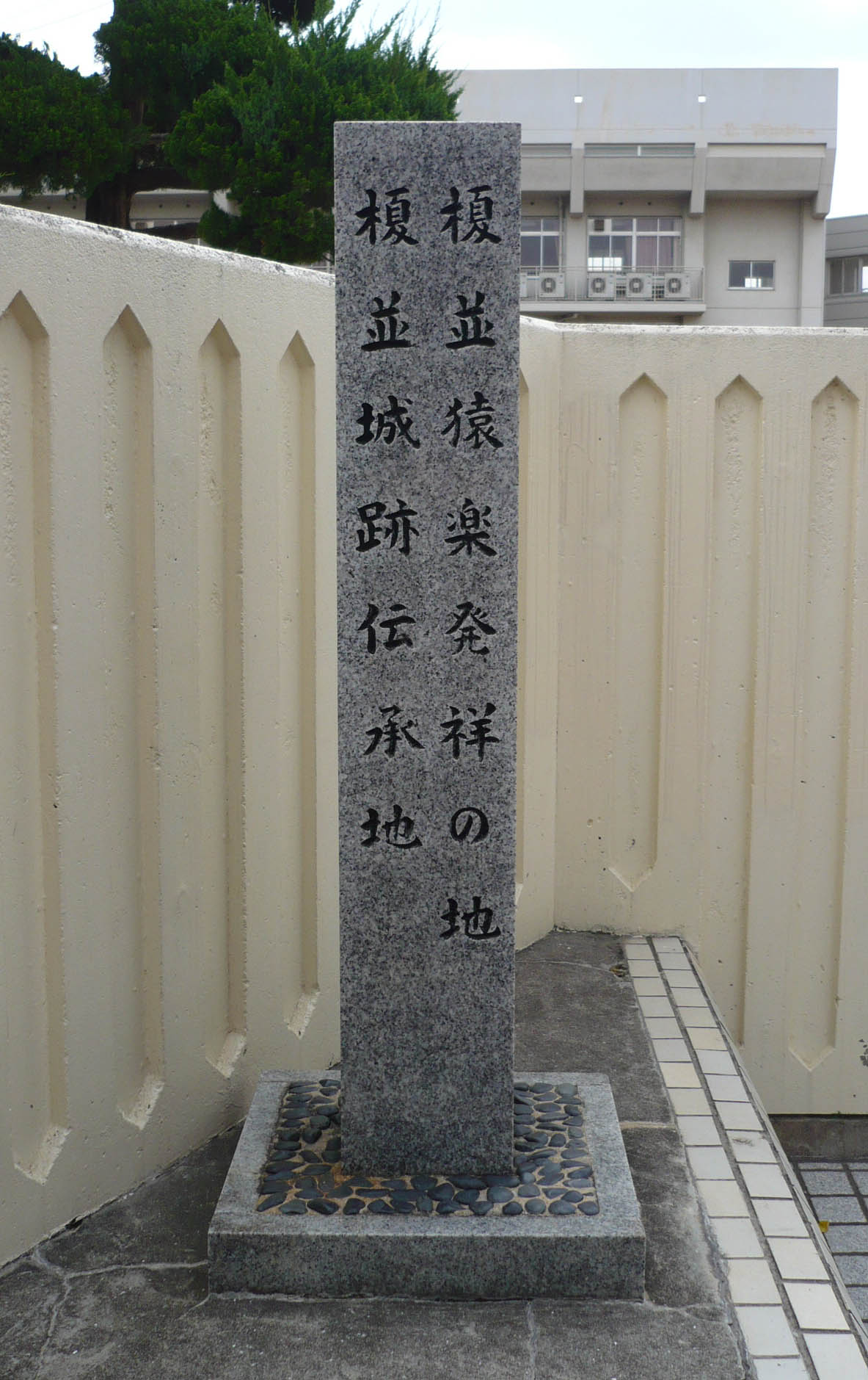 榎並城の石碑